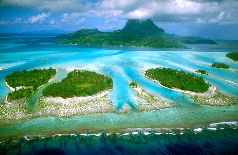 Bora Bora mit vorgelagerten Motus (Luftaufnahme)